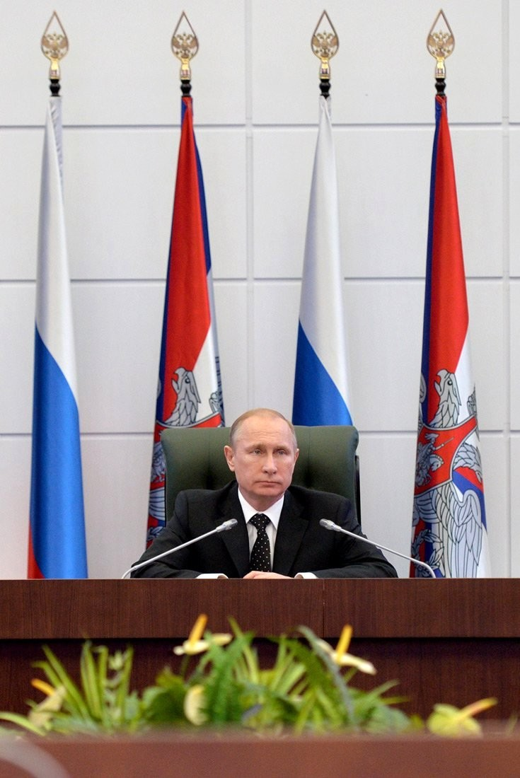 Владимир Путин в Национальном центре управления обороной Российской Федерации (зал управления и взаимодействия)